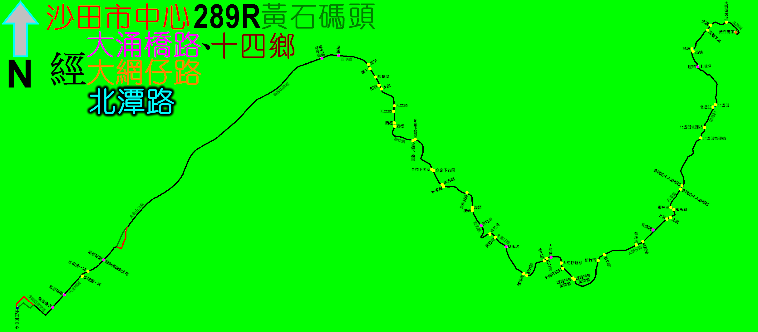 九巴289R線的走線圖